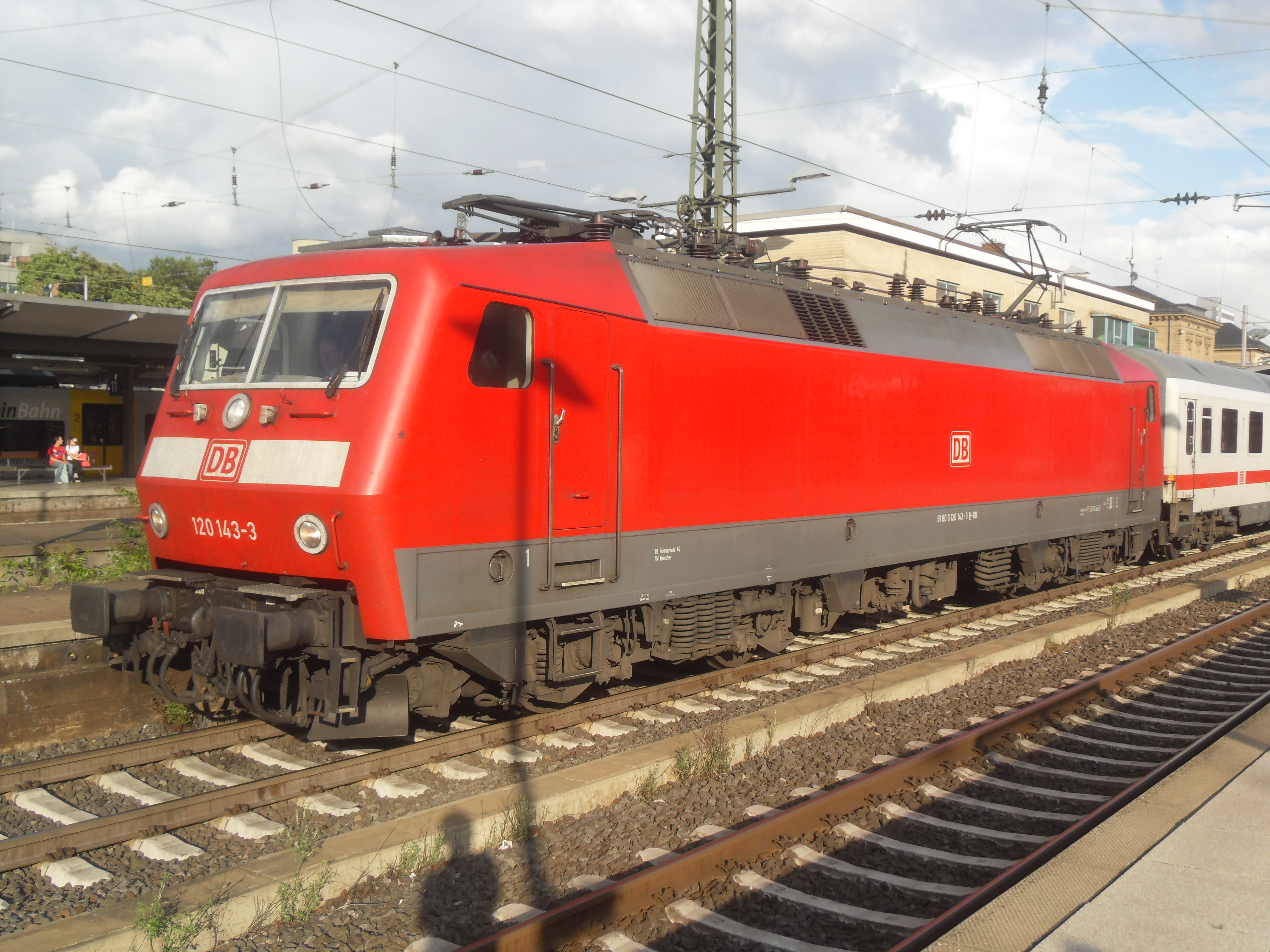 DB-Baureihe 120 mit InterCity im Mainzer Hauptbahnhof